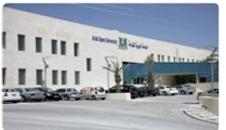 الجامعة العربية المفتوحة بالاردن